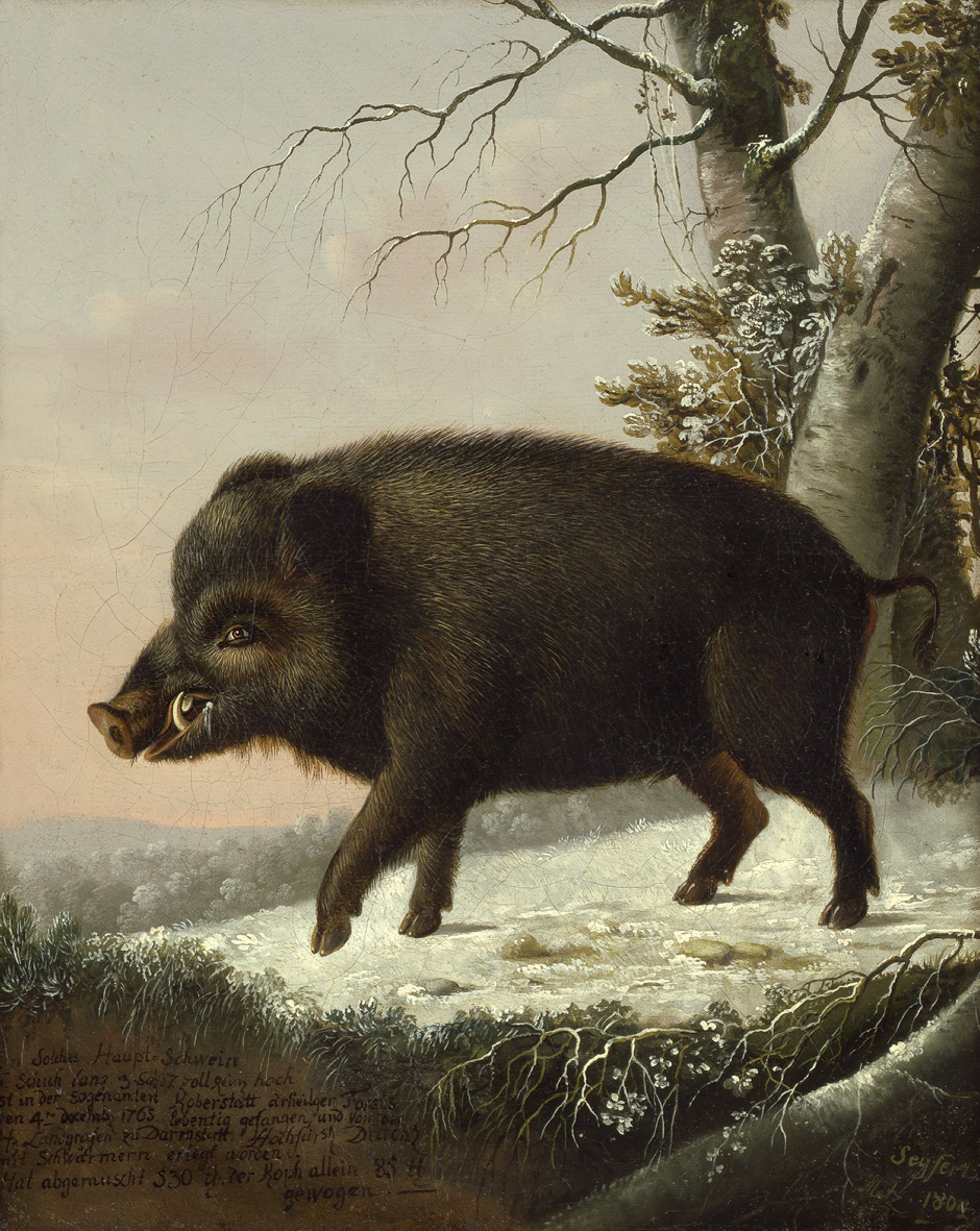 Ein Wildschwein im winterlichen Wald. Öl auf Leinwand. 37 x 29,5 cm. Unten rechts signiert und datiert "Seyfert. / Metz 1804" sowie unten links eigenhändig bez. "Ein solches Haupt=Schwein 6. Schuh lang. 3 sch . 7. zoll rei.. hoch ist in der sogenanten Roberstatt a´rheiliger Forsts den 4te Decemb 1765. lebentig gefangen, und des Hr. Landgrafen zu Darmstadt Hochfürstl. Durchl. mit Schwämern erlegt worden. Hat abgerauscht 530 lb. (altes Pfund-Kürzel) der Kopf allein 85 lb. gewogen."